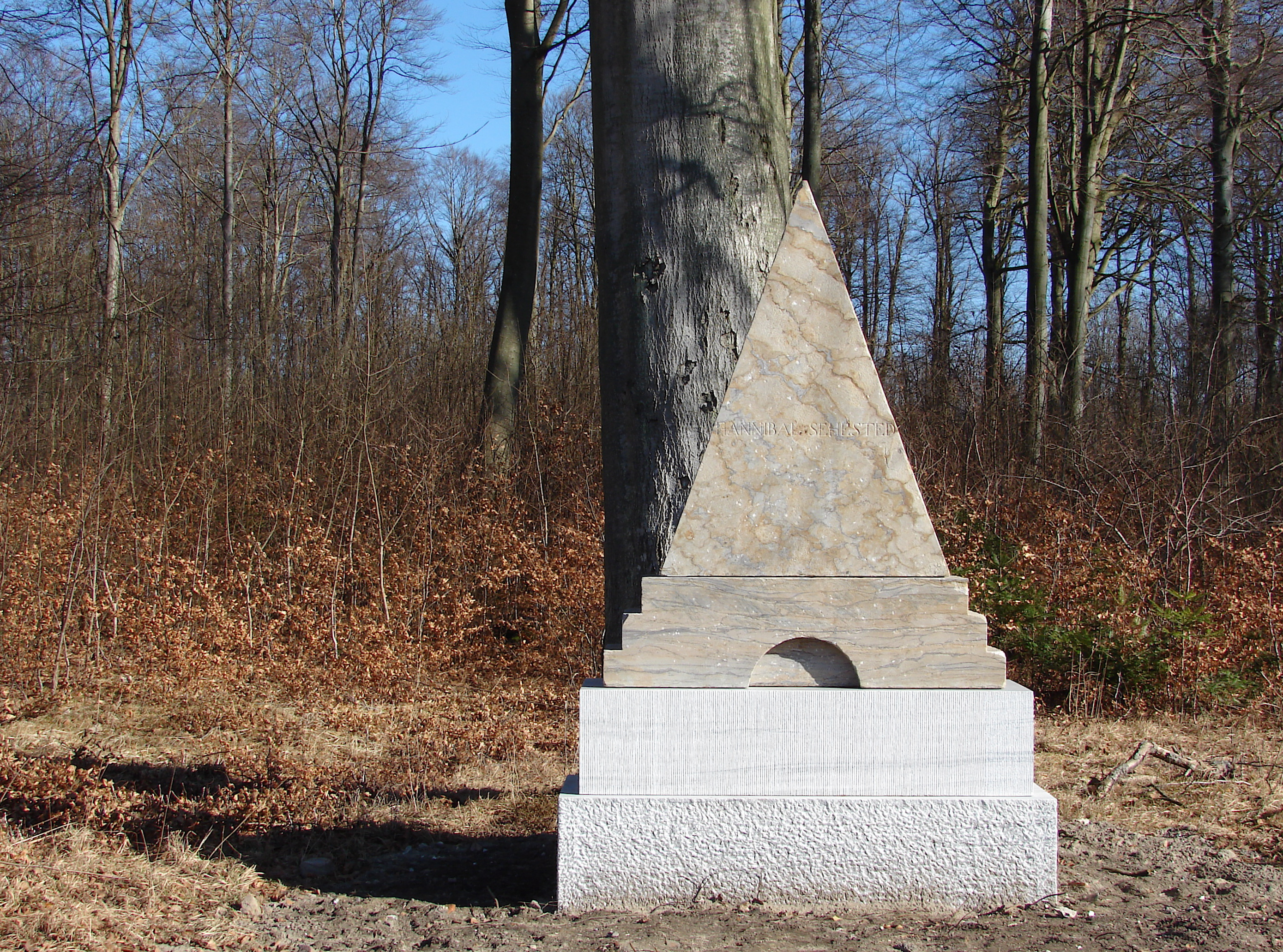 Mindesten over Hannibal Sehested, af Johannes Wiedewelt, 1780'erne, Jægerspris, Sjælland